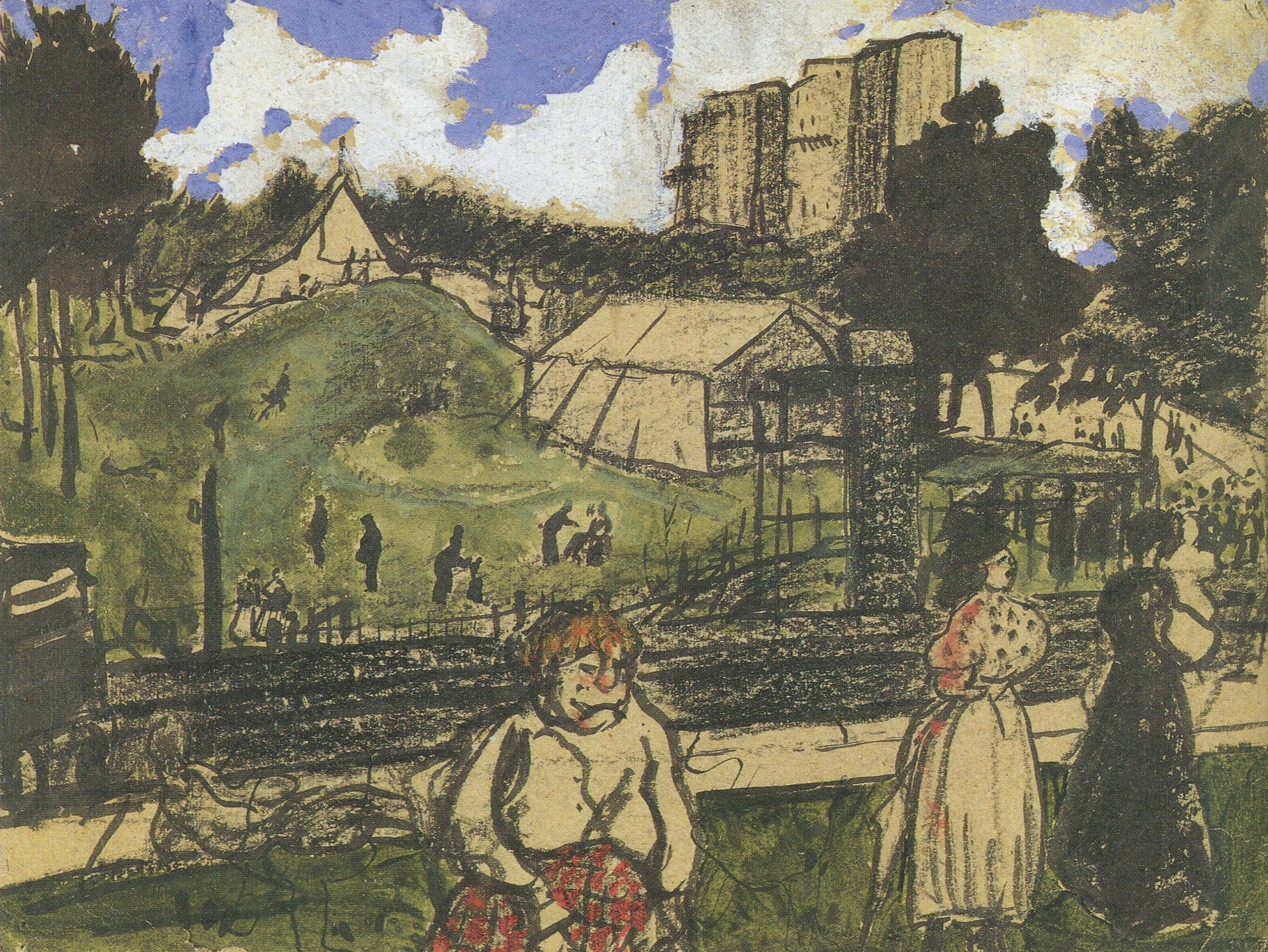 Rudolf Großmann: Buttes Chaumont, Aquarell 1906